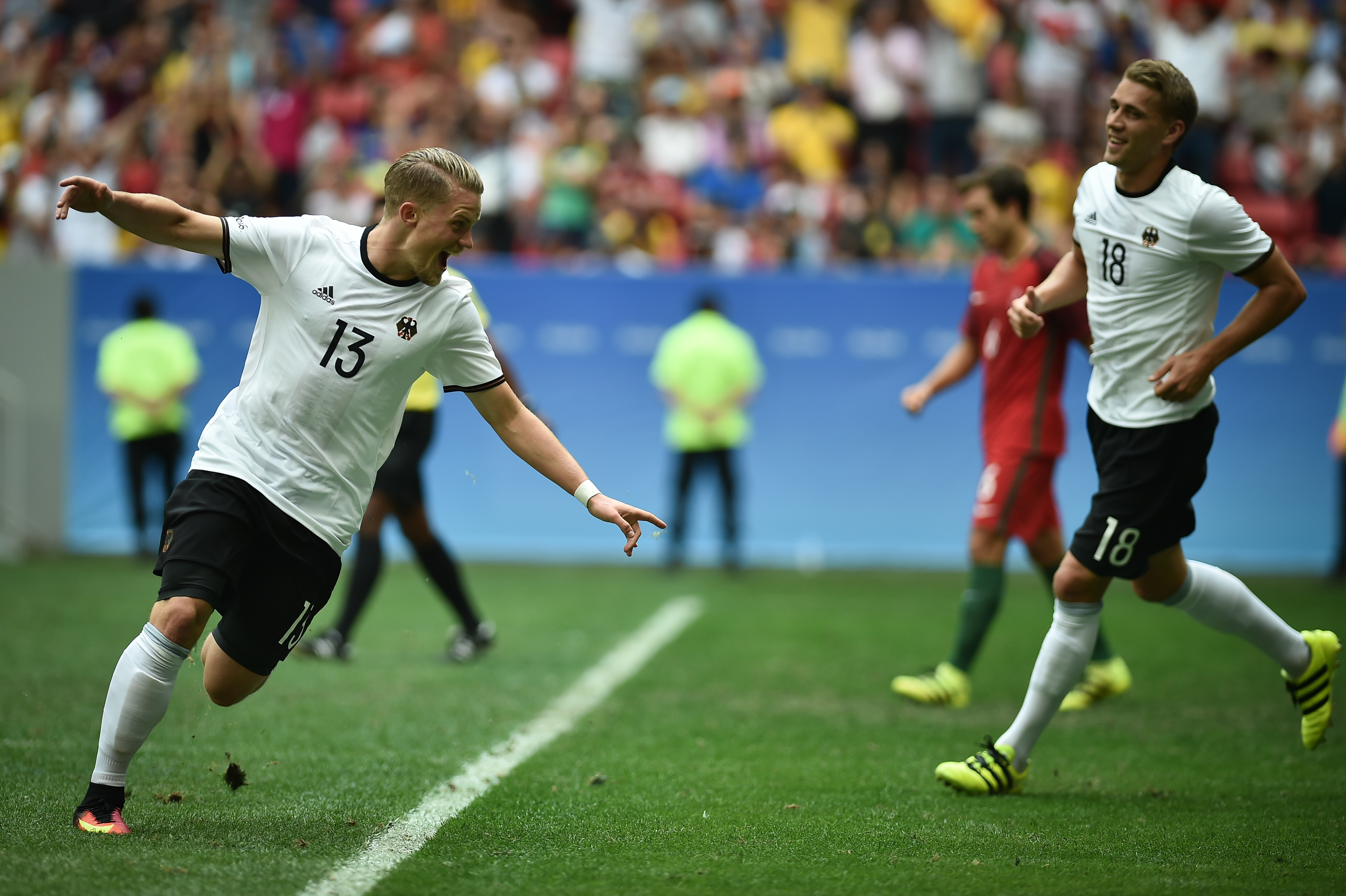 Estádio Nacional de Brasília Mané Garrincha, Brasília, DF, Brasil, 13/8/2016 Foto: Andre Borges/Agência Brasília Portigal e Alemanha jogam neste sábado (12), no Estádio Mané Garrincha, pelas quartas de final do futebol masculino nas Olimpíadas 2016.